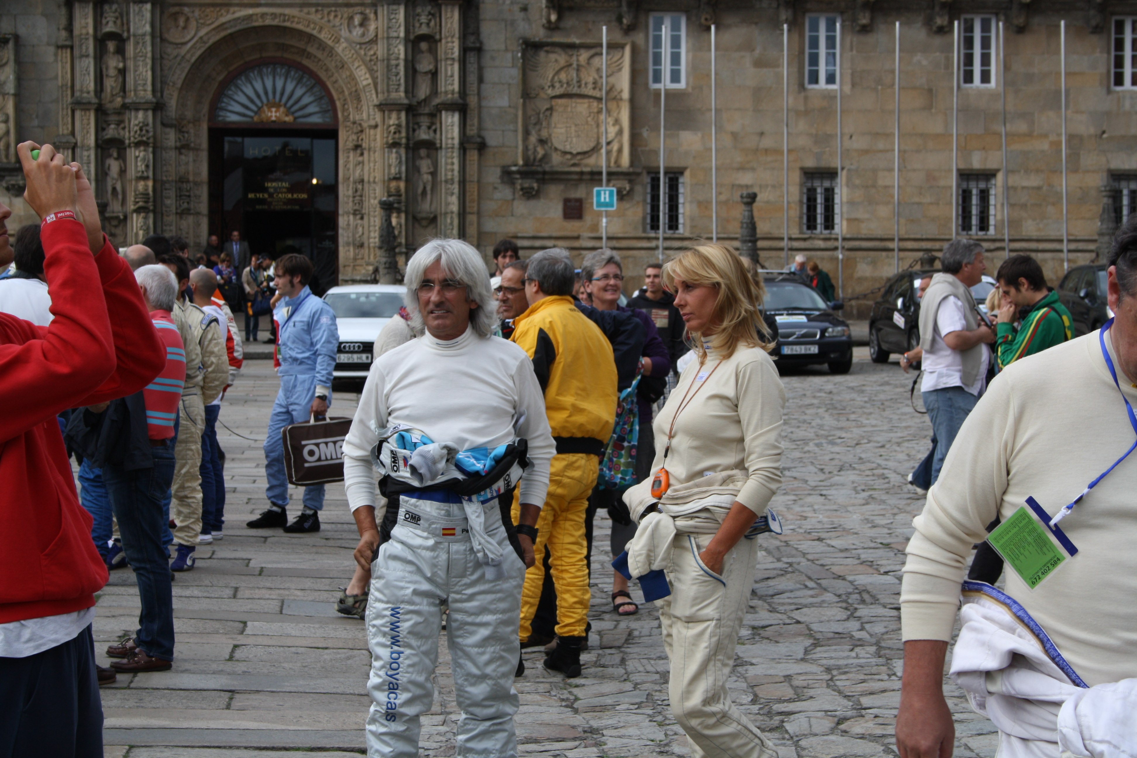 José Antonio Rodríguez Estévez Pioto de rally